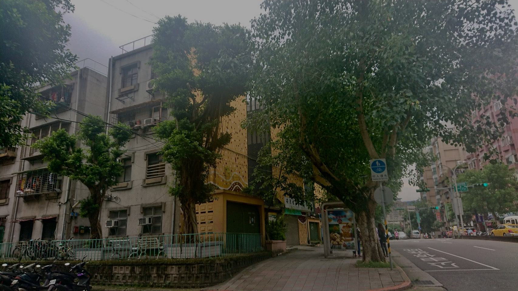 中文（台灣）: 安康社區一角